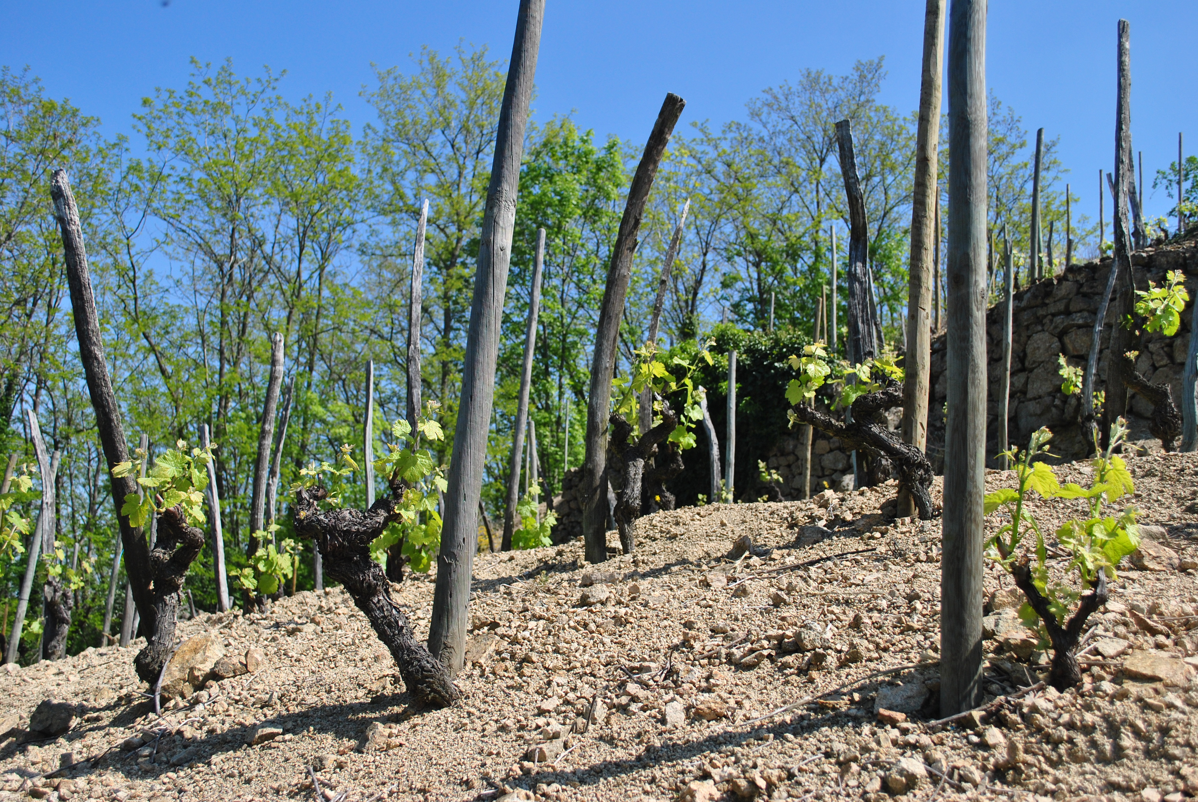 Jeunes vignes des comtés-rhodaniens en Ardèche